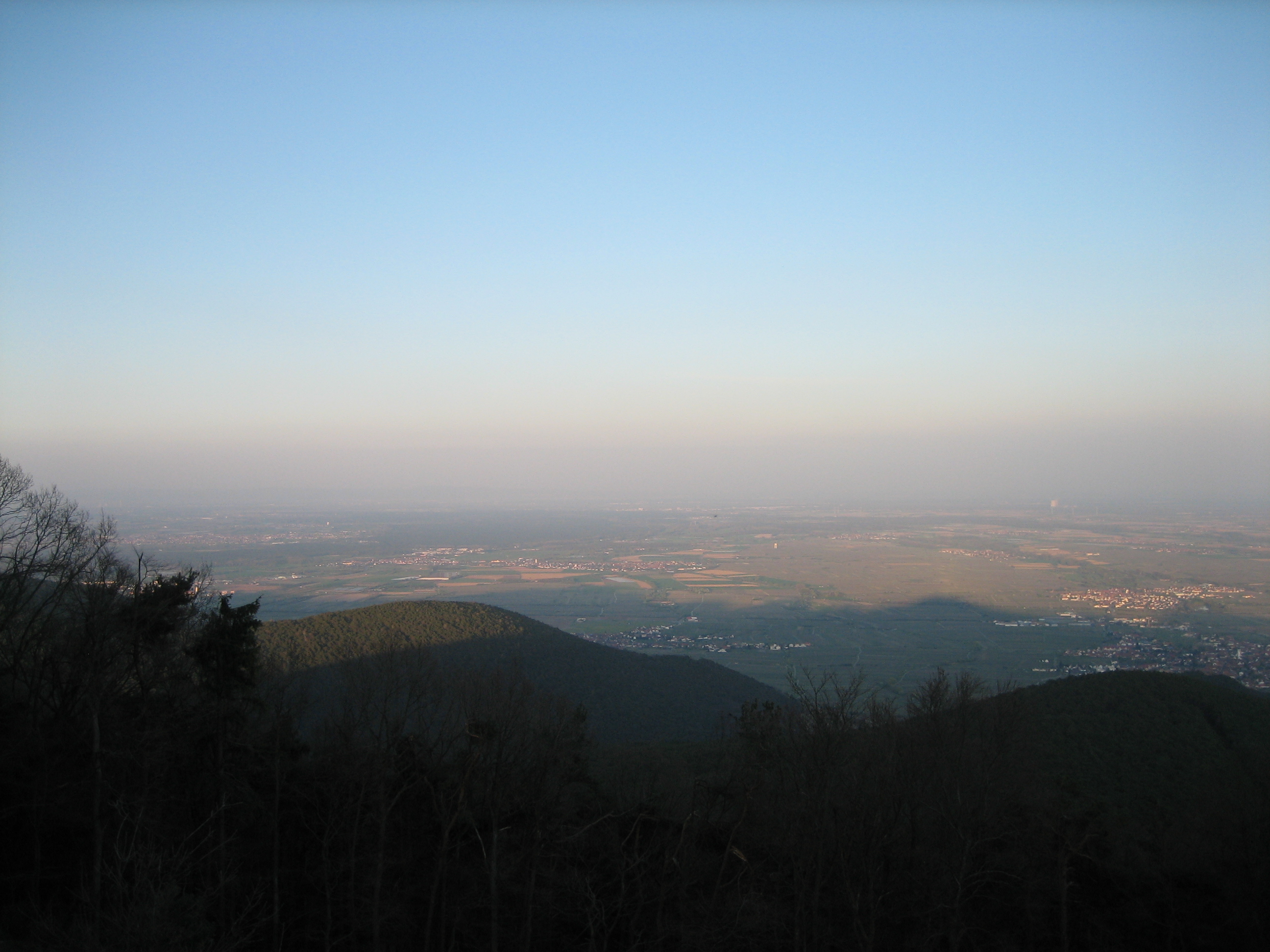 Blick von der Kalmit gen Osten